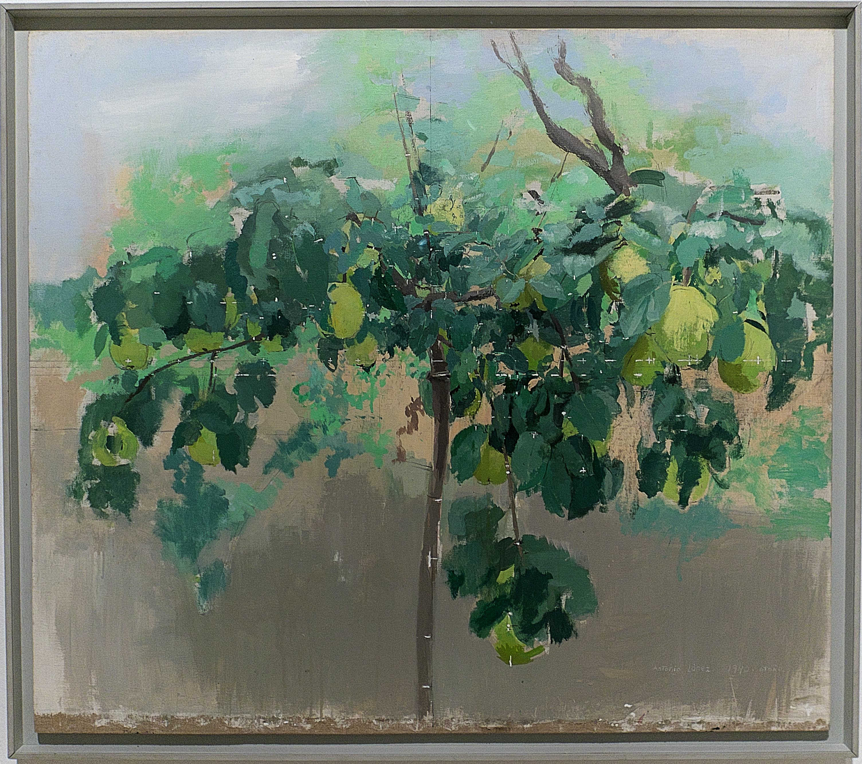 Fundación Fondo de Cultura de Sevilla.